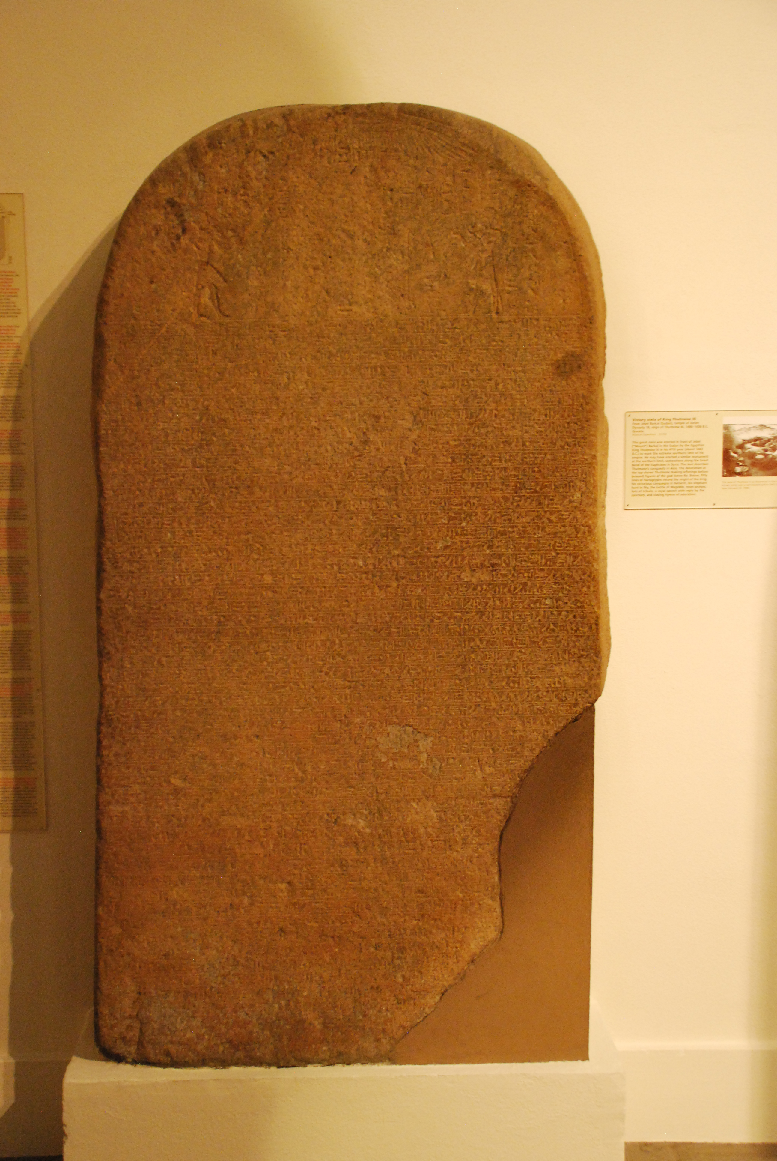 Victory stela of pharaoh Thutmose III, from Jebel Barkal, temple of Amen. Made of granite, from the 18th dynasty, circa 1490-1436 B.C. Erected during his 47th regnal year (roughly 1443 B.C.) marking his kingdom's southern boundary. 50 lines of hieroglyphs mark his campaigns in Naharin, the Battle of Megiddo, an elephant hunt, a royal speech, and more. Now residing in the Museum of Fine Arts, Boston. Details